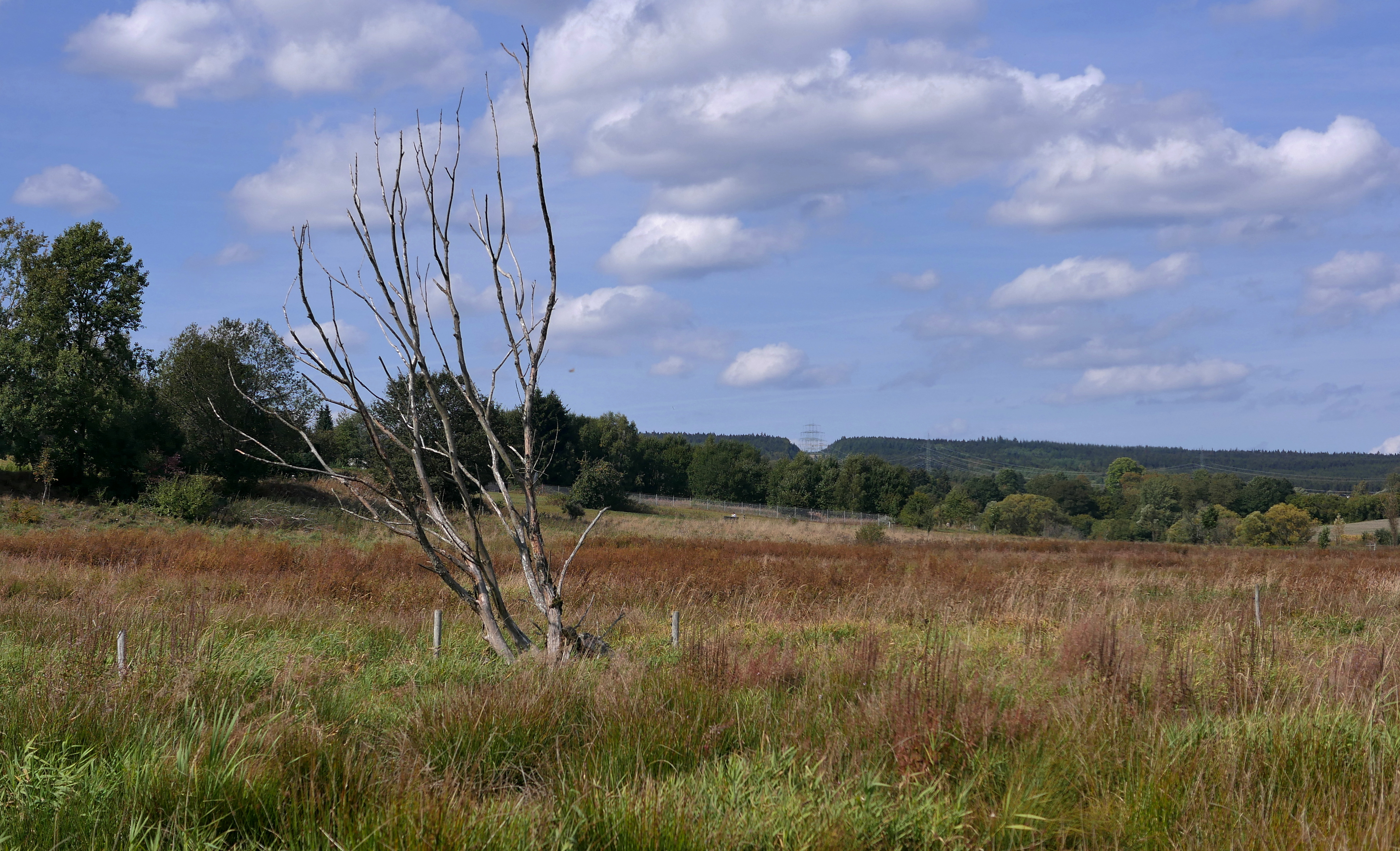 Naturschutzgebiet Osterbachtal bei Reinsfeld - Mitte des Gebiets